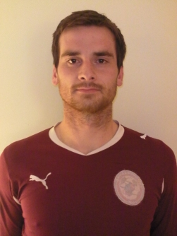 Якуб Хлебоун